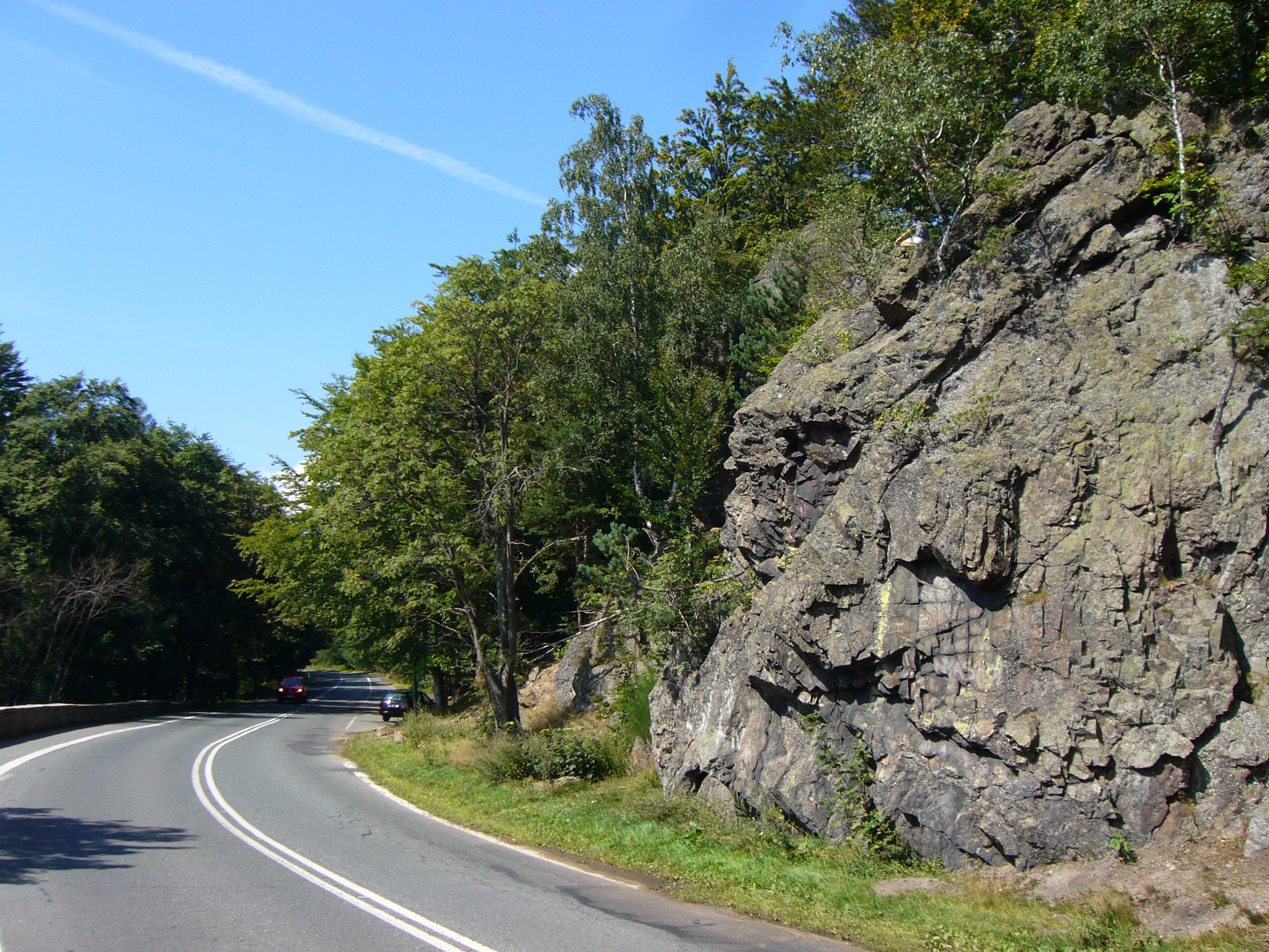 Zakręt śmierci. Widok na skałki nad nim i zjazd w kierunku do Szklarskiej Poręby.